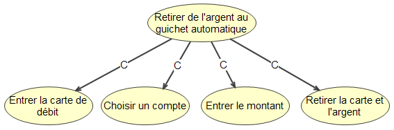 Mot composition de procédures